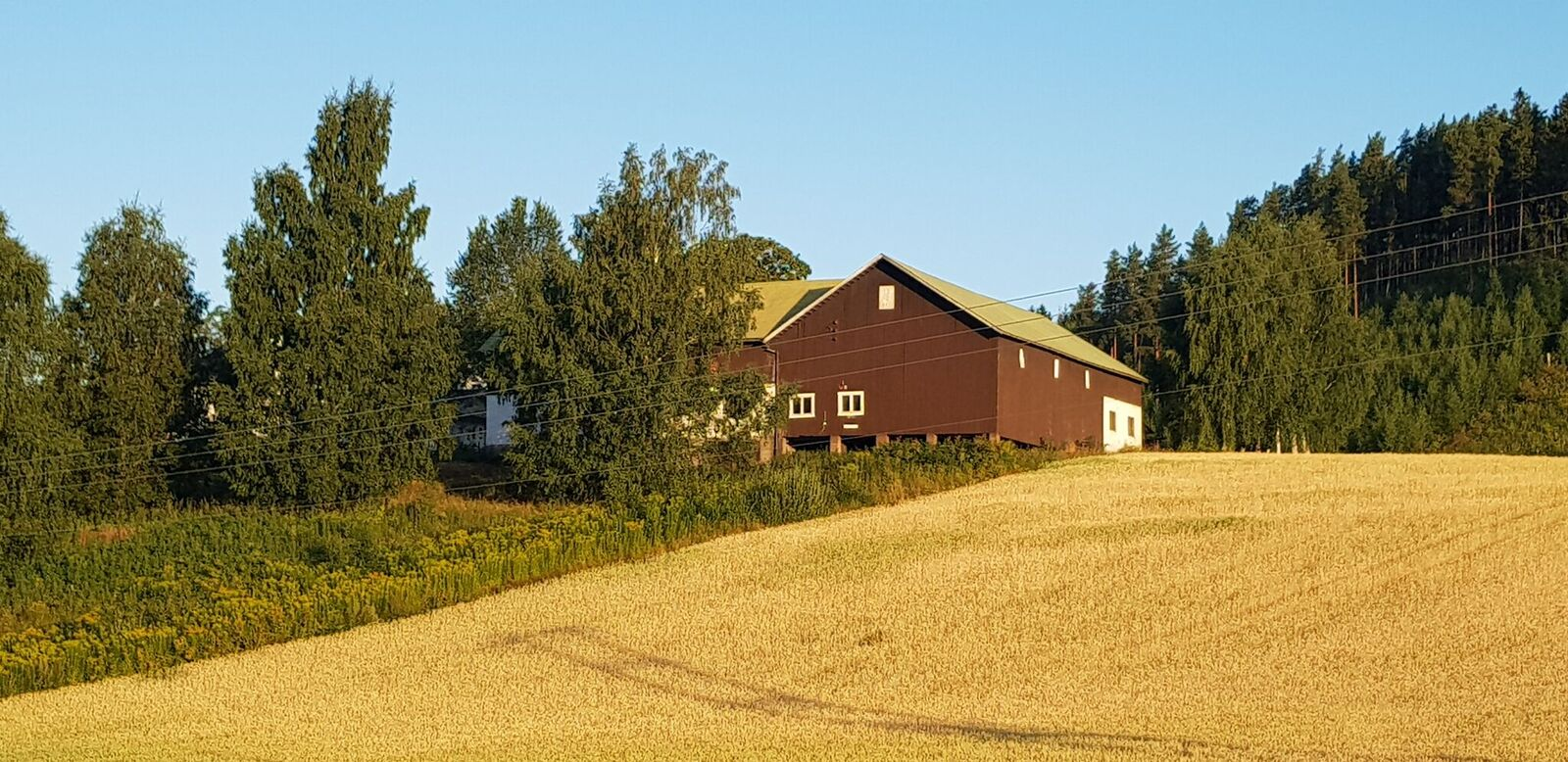 Sett østfra